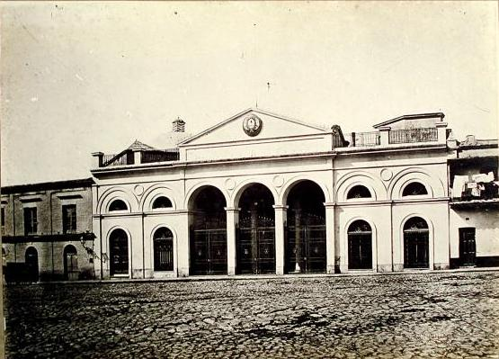 Congreso de la Nación Argentina (desde 1864, luego fue el Archivo General de la Nación). Sede en Plaza de Mayo, demolida en 1942.